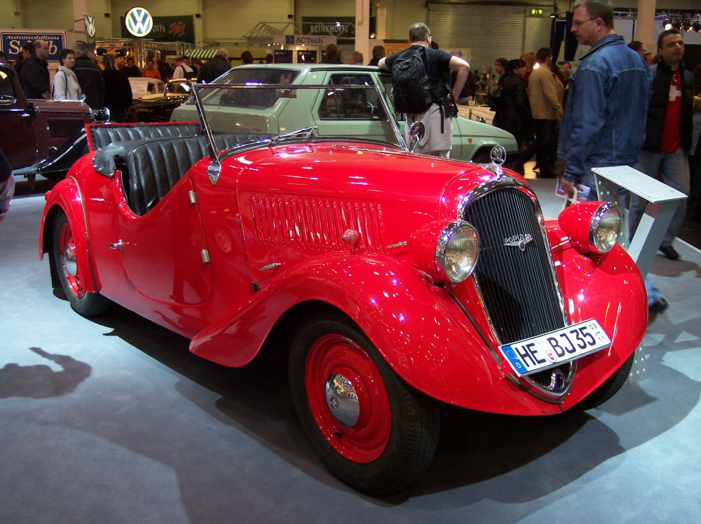 Škoda 420 Popular Cabriolet (1935) (Techno Classica Essen 2007)